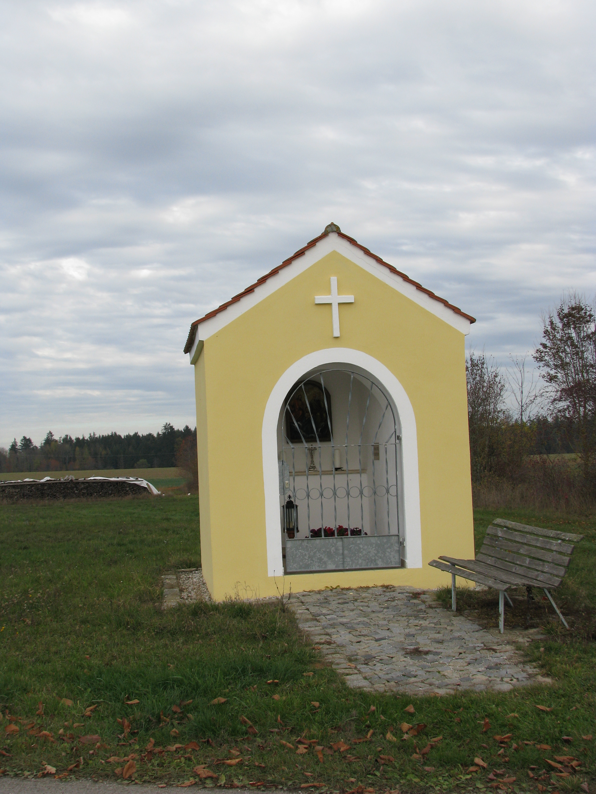 Birkhof, Ortsteil von Greding im mittelfränkischen Landkreis Roth in Bayern, Wegkapelle, 2002 errichtet